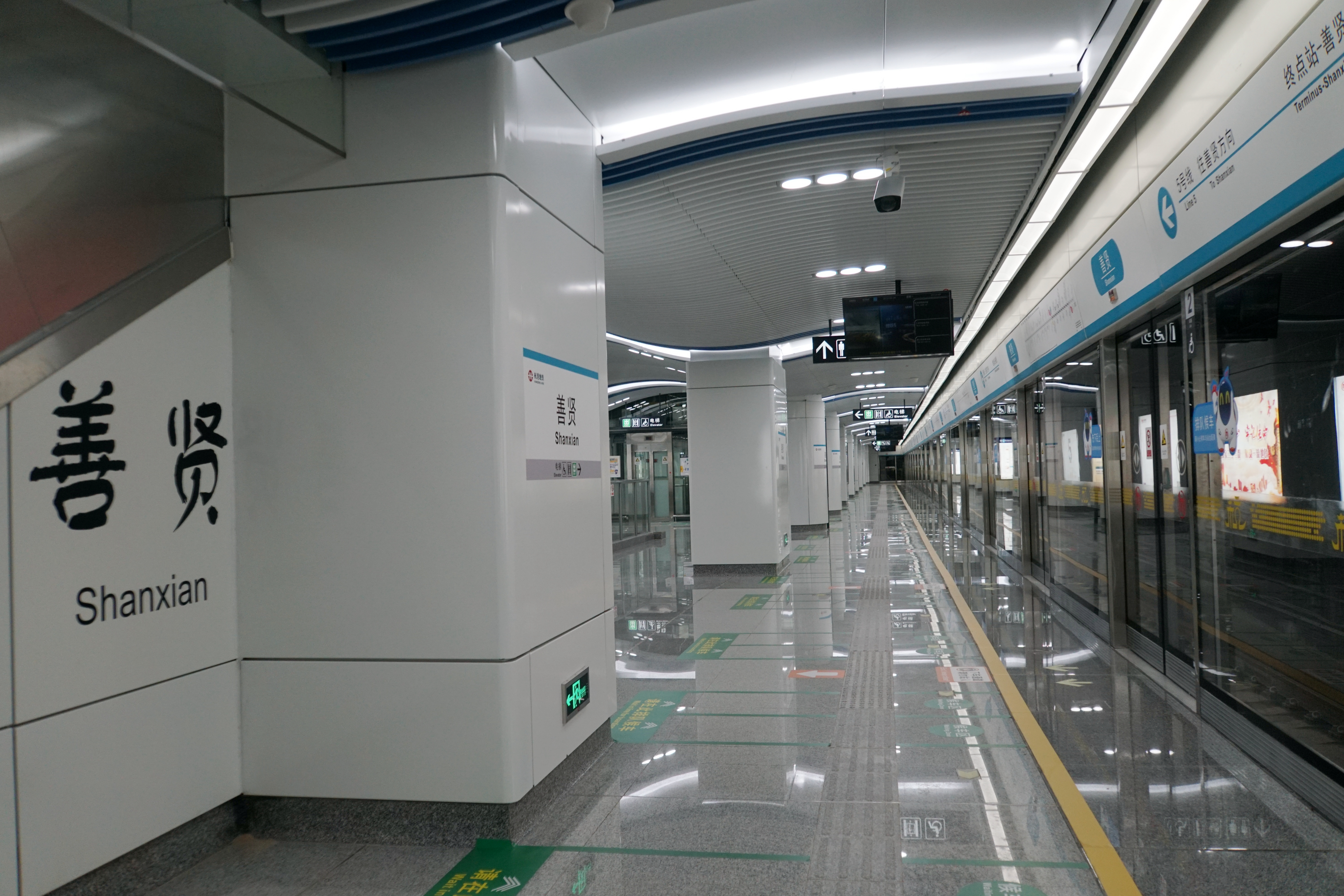 善贤站站台